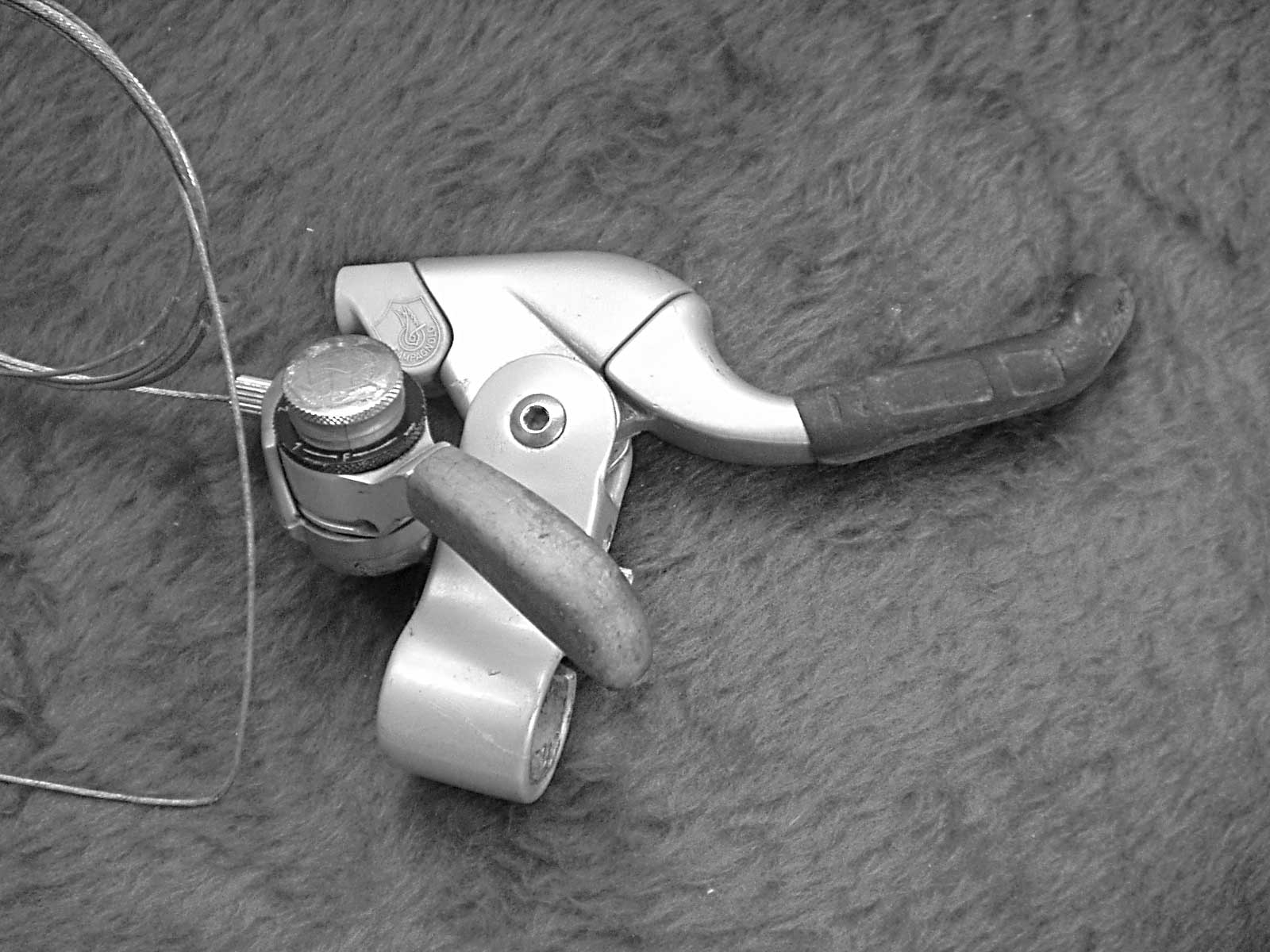 Bulletgriff